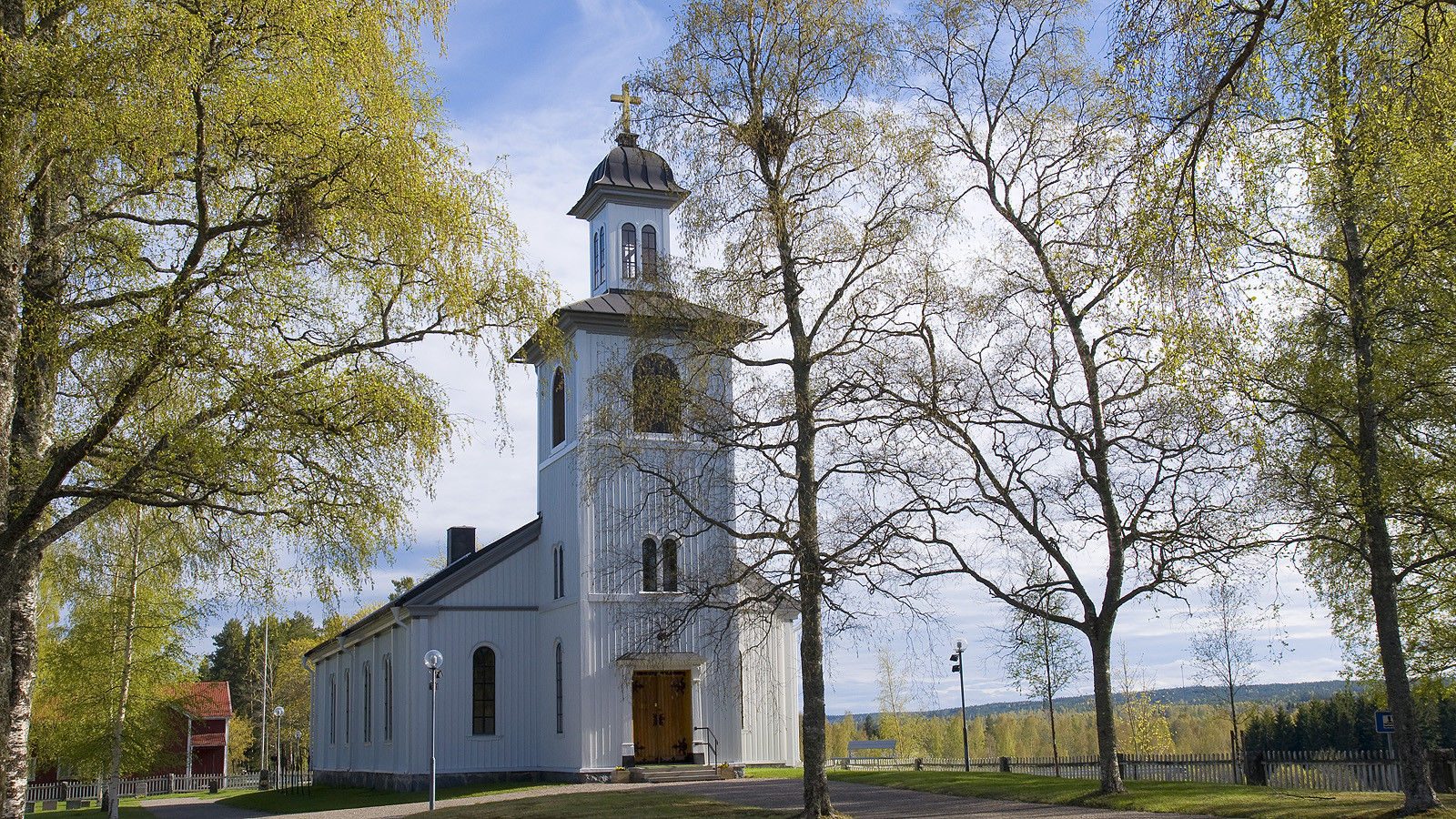 Lingbo kyrka. Invigd 2 augusti, 1829.